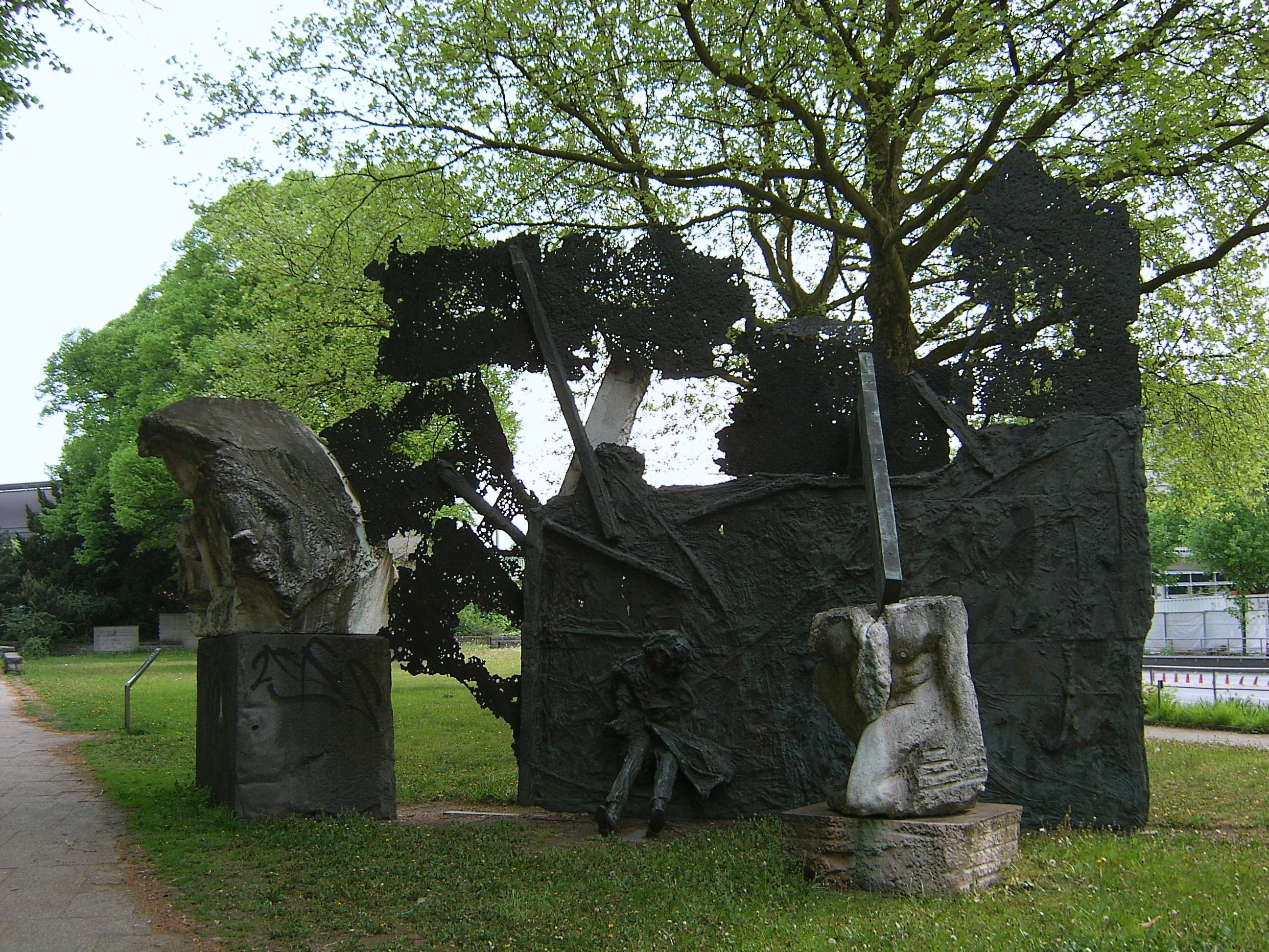 Bildbeschreibung: Hamburg, Innenstadt, Dammtor, Kriegerdenkmal Fotograf: selbst Datum: 13.5.2006